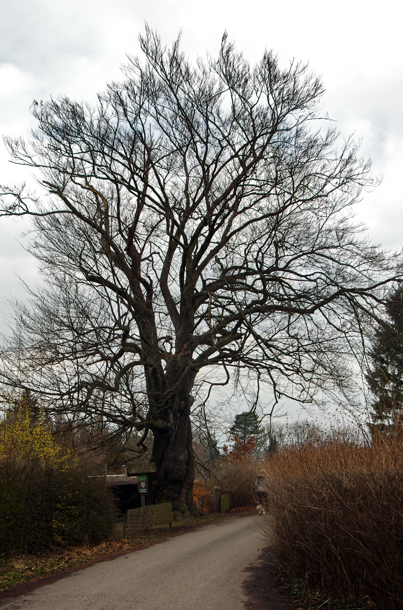 Památný strom - Buk u Harta - Karlovy Vary, místní část Drahovice